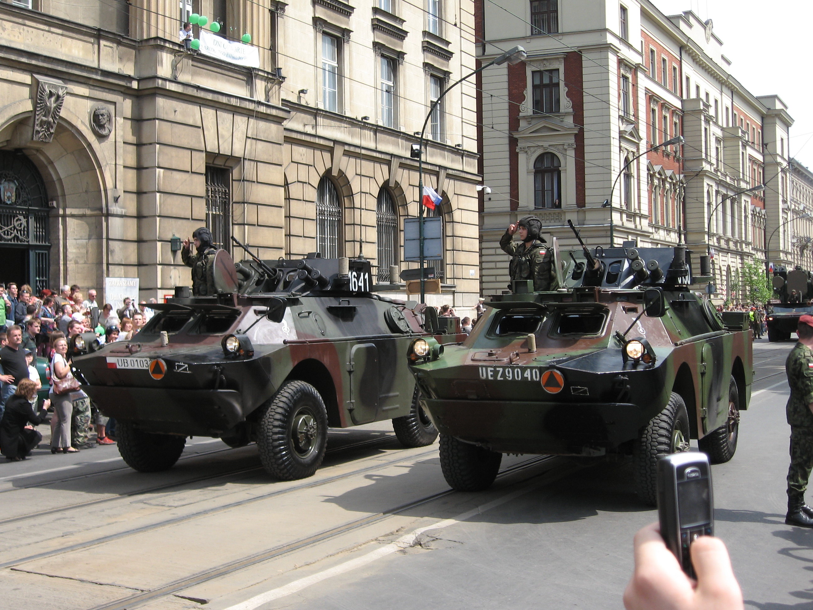 Two BRDM-2M-97 "Żbik-B" on a military parade in Kraków.